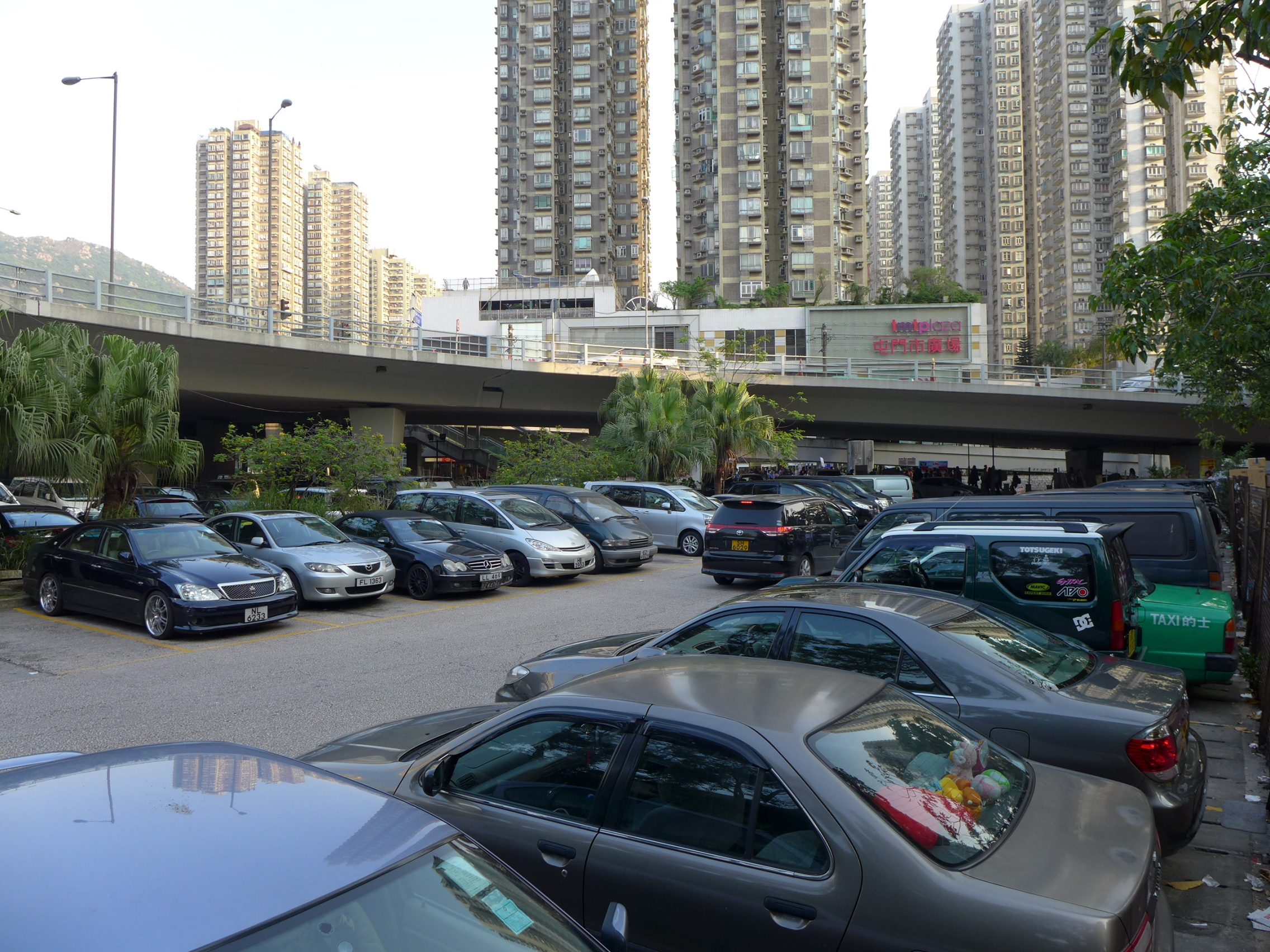 Yan Ching Street Site, Tuen Mun